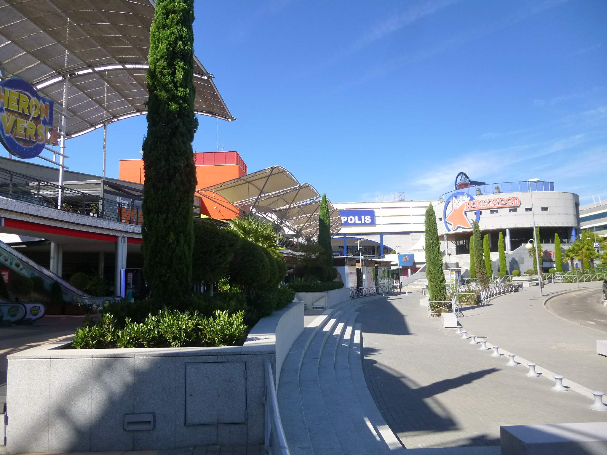 Alcobendas - La Moraleja, Centro de ocio Herón Diversia